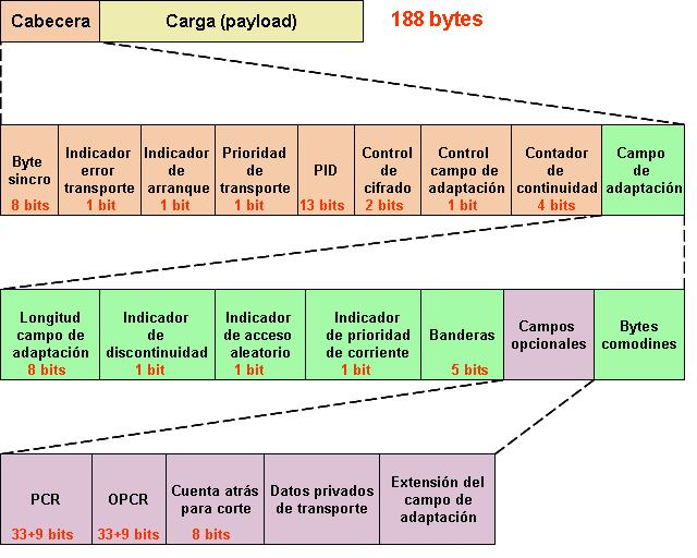 Transport Stream